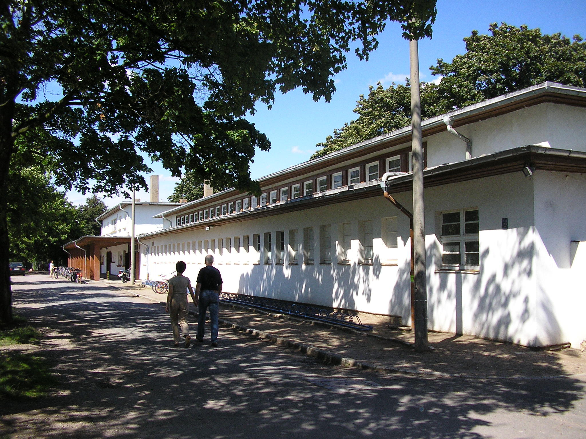 Nordbad Erfurd, Parkseite